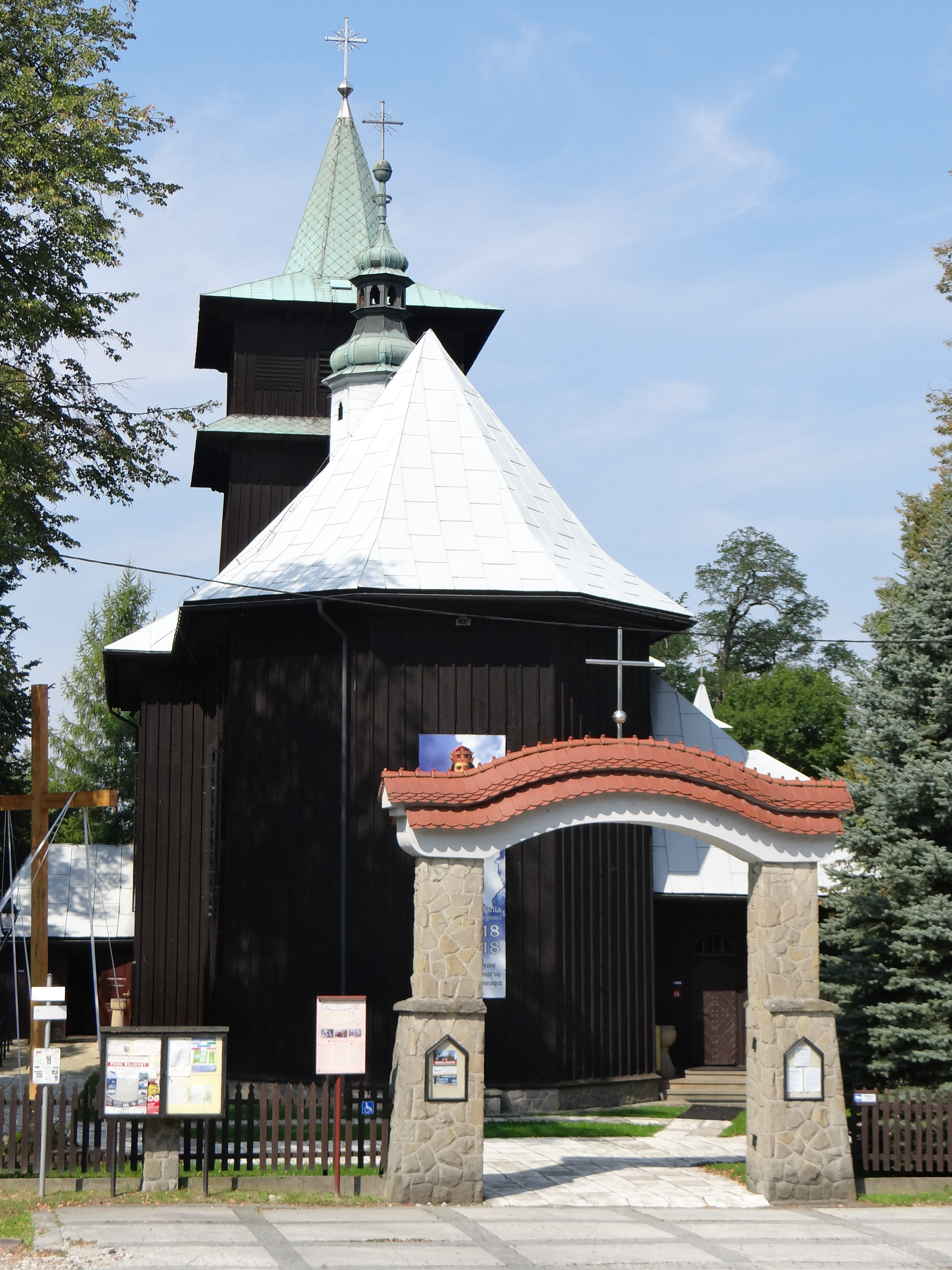 Kościół św. Marcina w Marcyporębie Gmina Brzeźnica